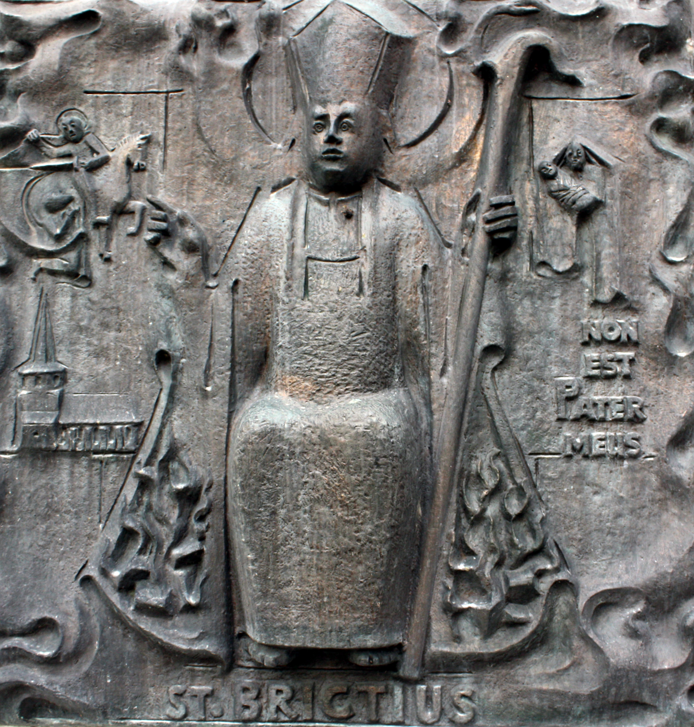 Hürth-Stotzheim, St, Brictius Verehrung an der Kirchenfrontseite